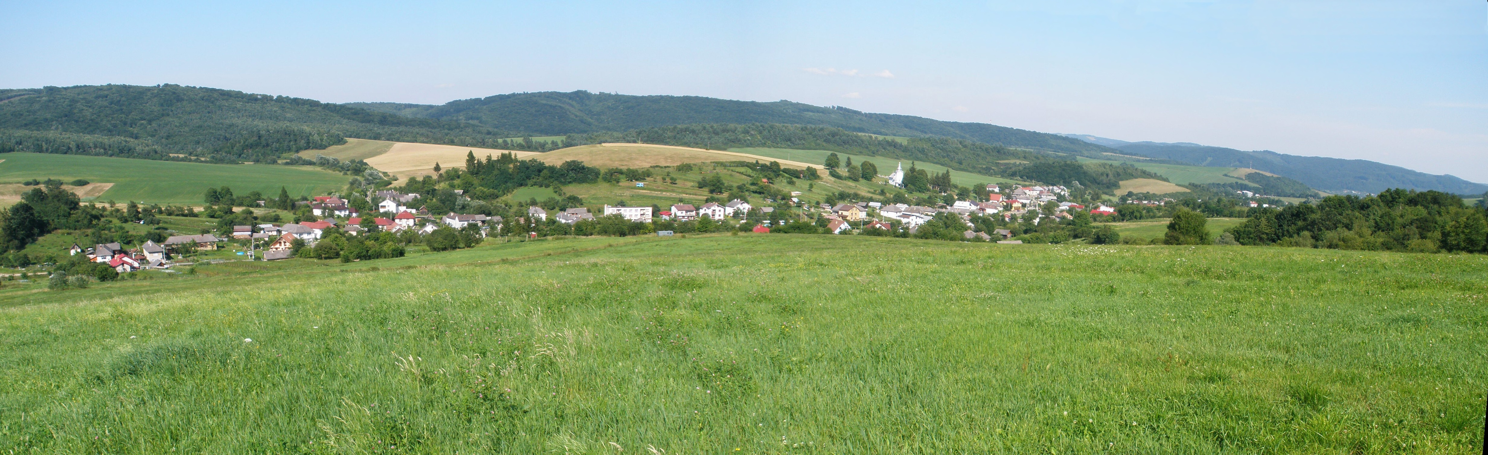 Panoráma Vyšnej Olšavy